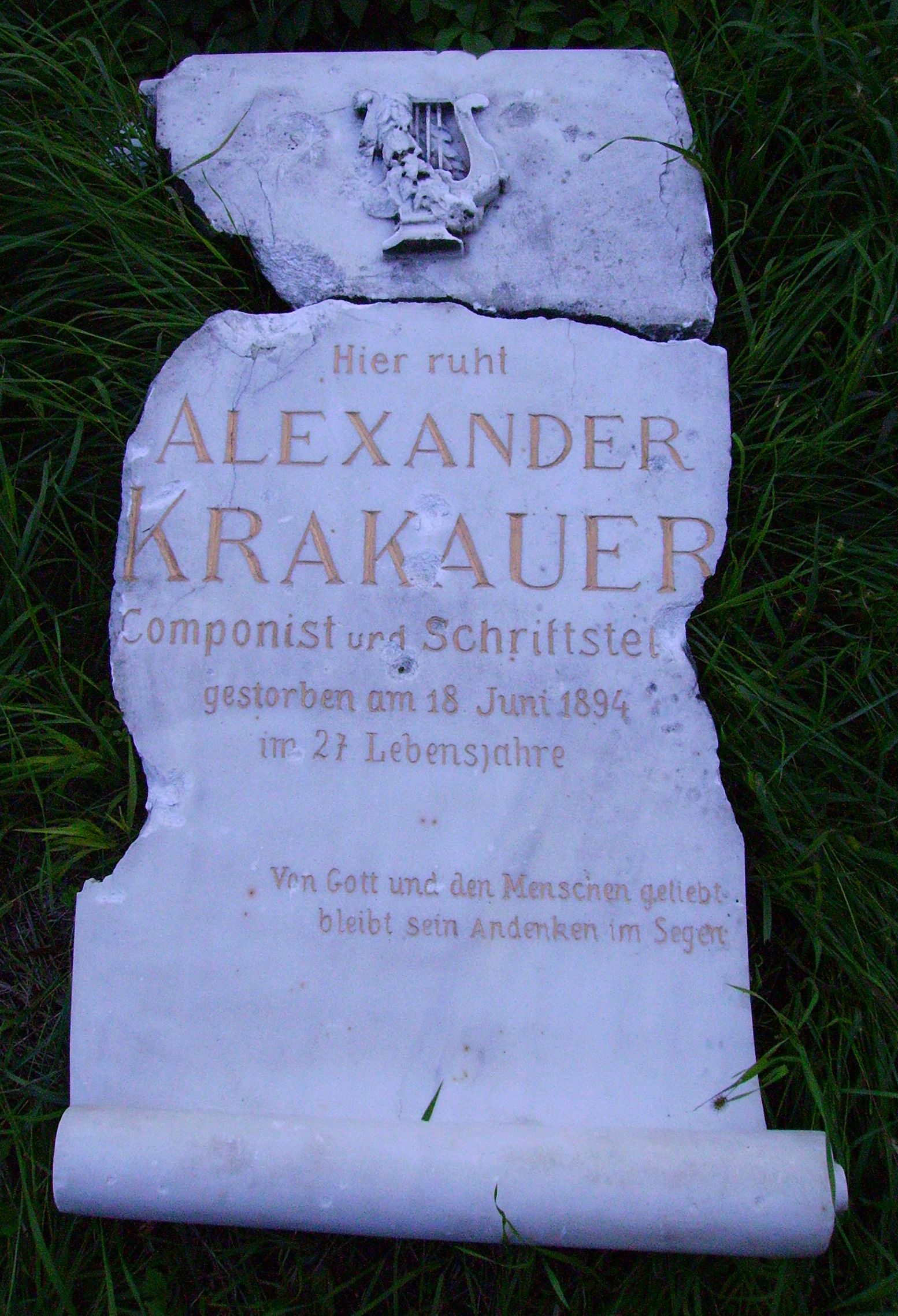 Überreste des im Zweiten Weltkrieg durch Bomben zerstörten Grabsteins für Alexander Krakauer (1866-1894), Komponist und Verfasser von Wienerliedern. Zentralfriedhof 1. Tor (Alter jüdischer Friedhof, Gruppe 20, Reihe 22, Nr. 12)